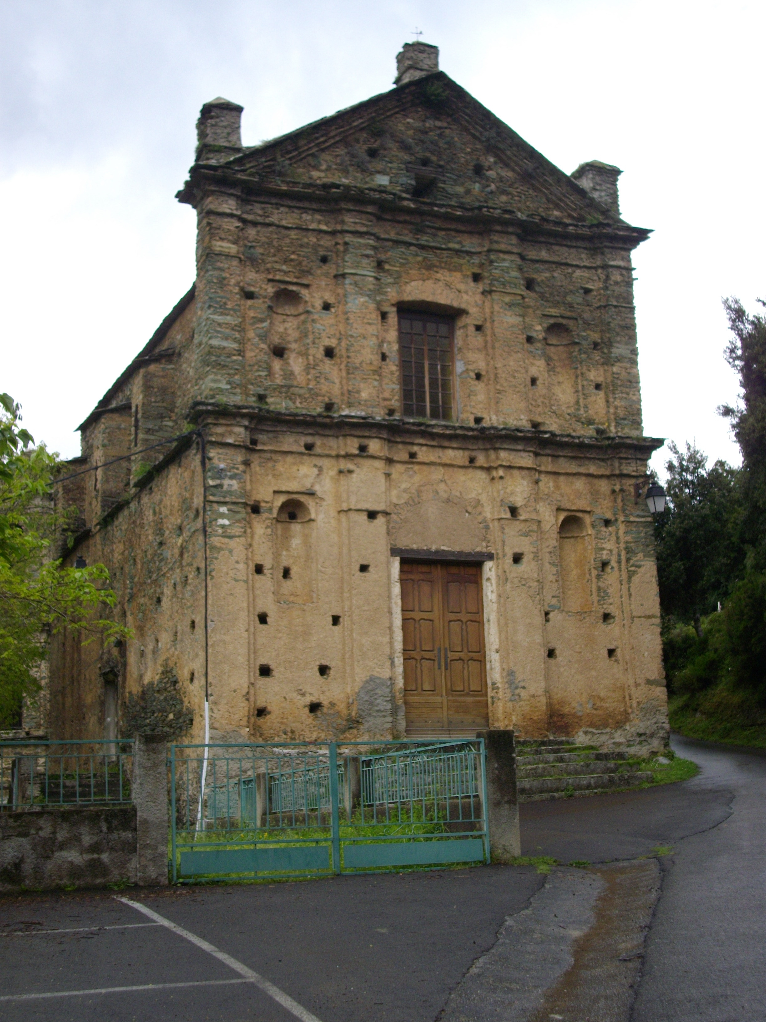 Scata, Castagniccia (Haute-Corse) - L'église paroissiale Sainte-Cécile a été mentionnée en 1646 dans le rapport de visite pastorale de Mgr Marliani, évêque de Mariana et Accia.